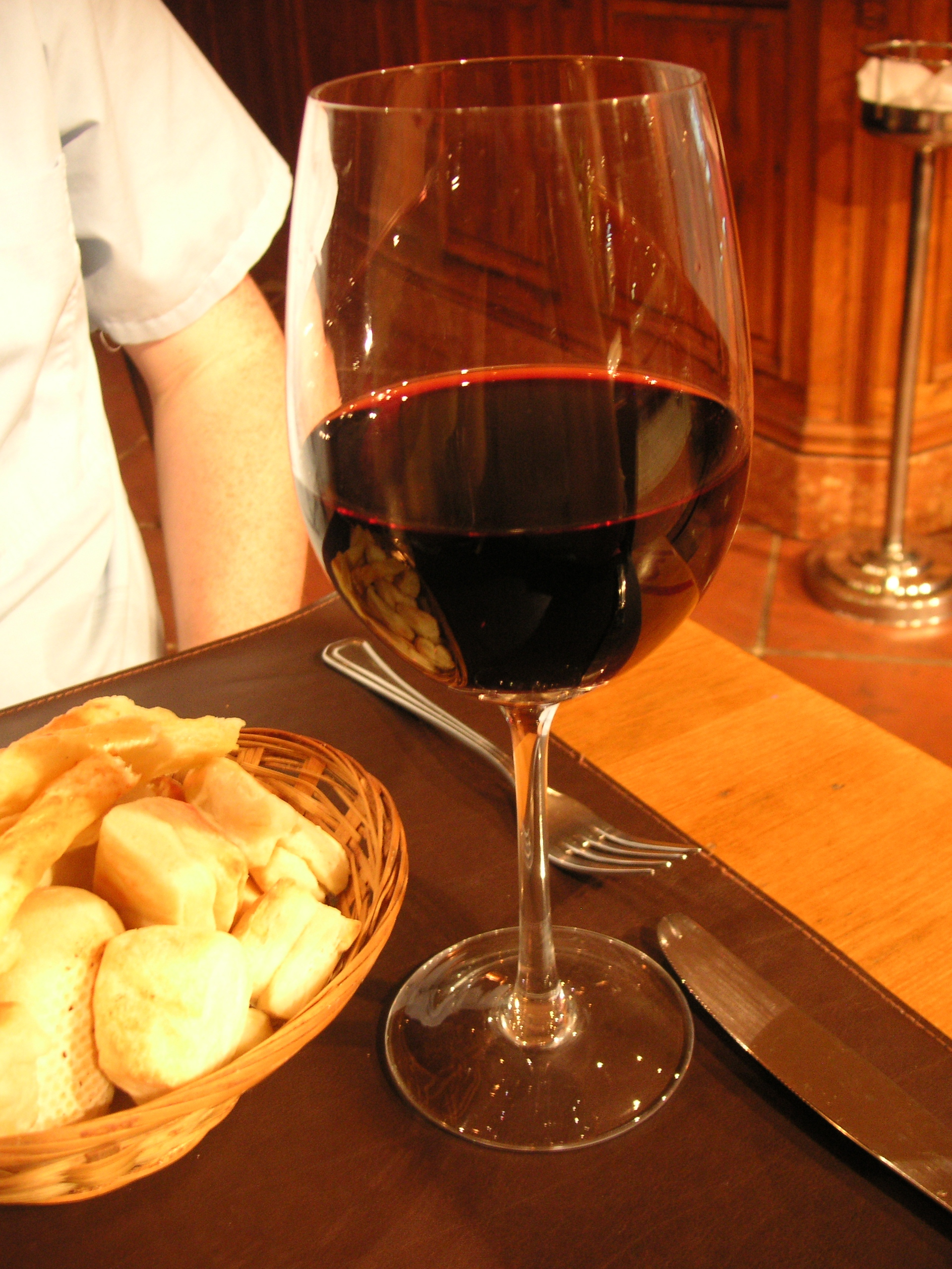 Red Argentine wine